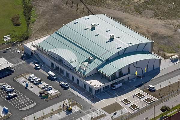 Sárvár Aréna légi fotón